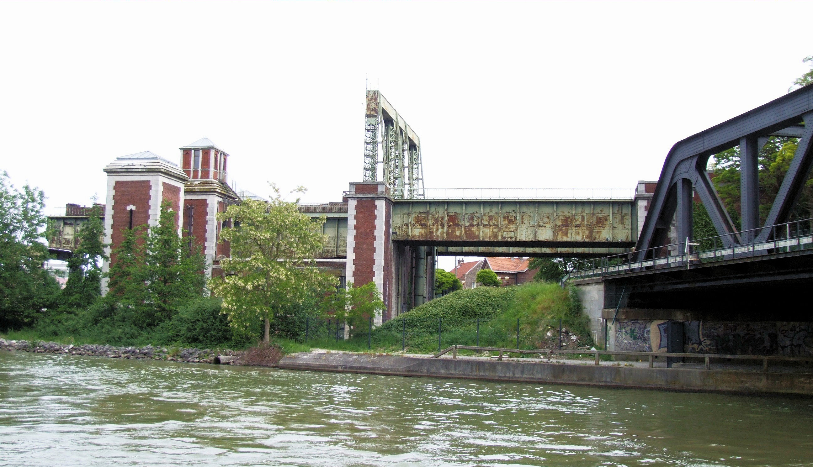 Arques - Ascenseur à bateaux des Fontinettes - Pont-canal pour accéder à l'ascenseur